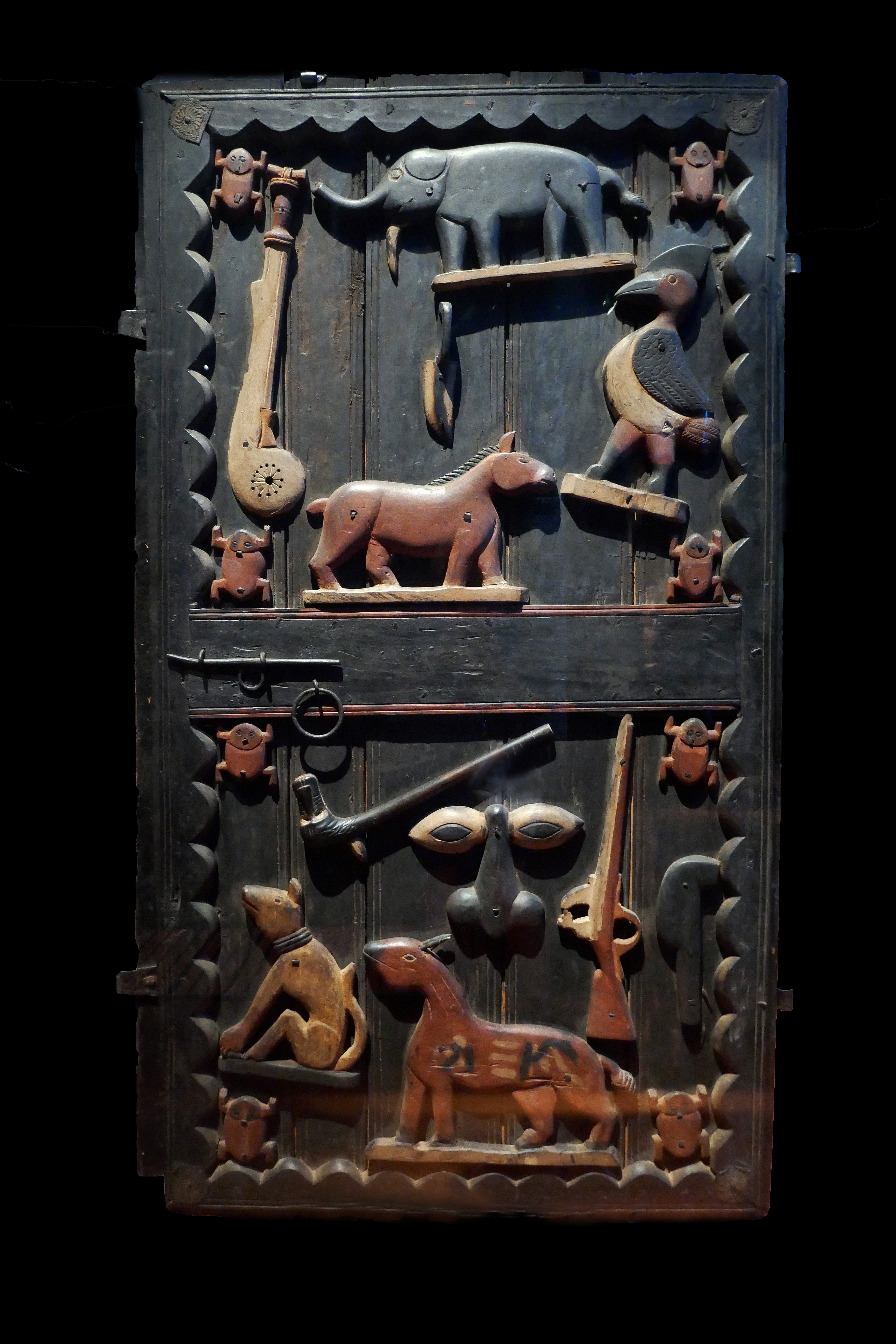 Porte du palais royal d'Abomey Atelier Sossa Dede Date : vers 1889 Bois polychrome, pigments, métal L'une des 4 portes exposées au musée du Quai Branly. N° d'inventaire : 71.1893.45.4